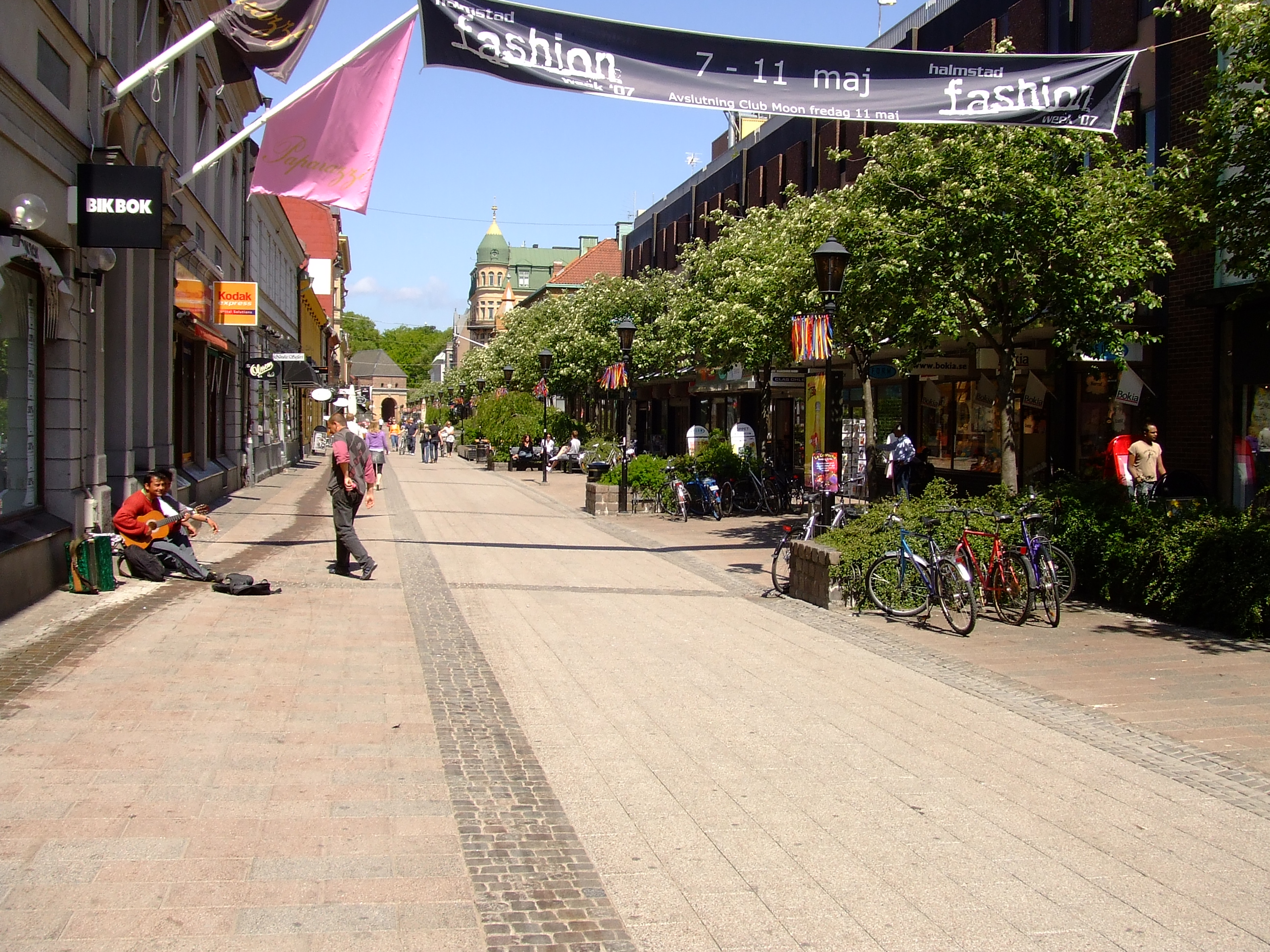 Storgatan (Big street) in Halmstad, Sweden.